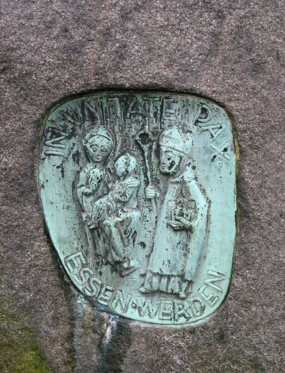 Detailaufnahme des Markuskreuzes in Essen-Bredeney, auf dem die Goldene Madonna stellvertretend für das Stift Essen abgebildet ist.